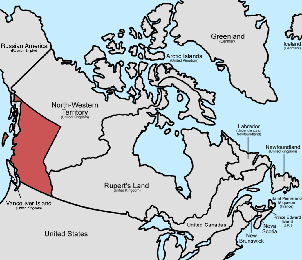 Carte de la colonie de la Colombie-Britannique avant son annexion au Canada. Réalisée à partir de